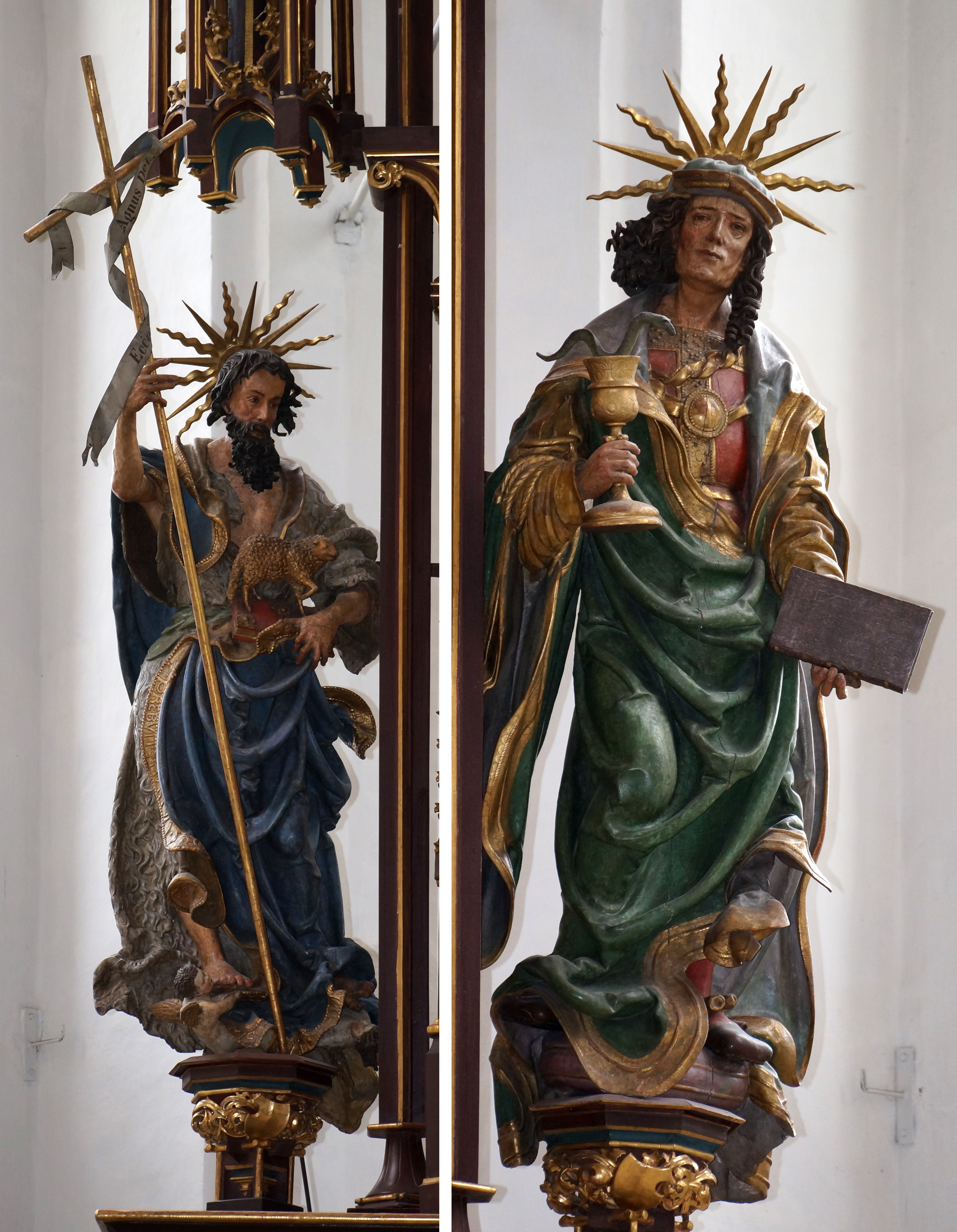 Gesprenge am Leinberger-Altar im Kastulusmünster von Moosburg. Links ist Johannes der Täufer, rechts Johannes Evangelist. Fotomontage (zwischen beiden Figuren ist der Schrein).